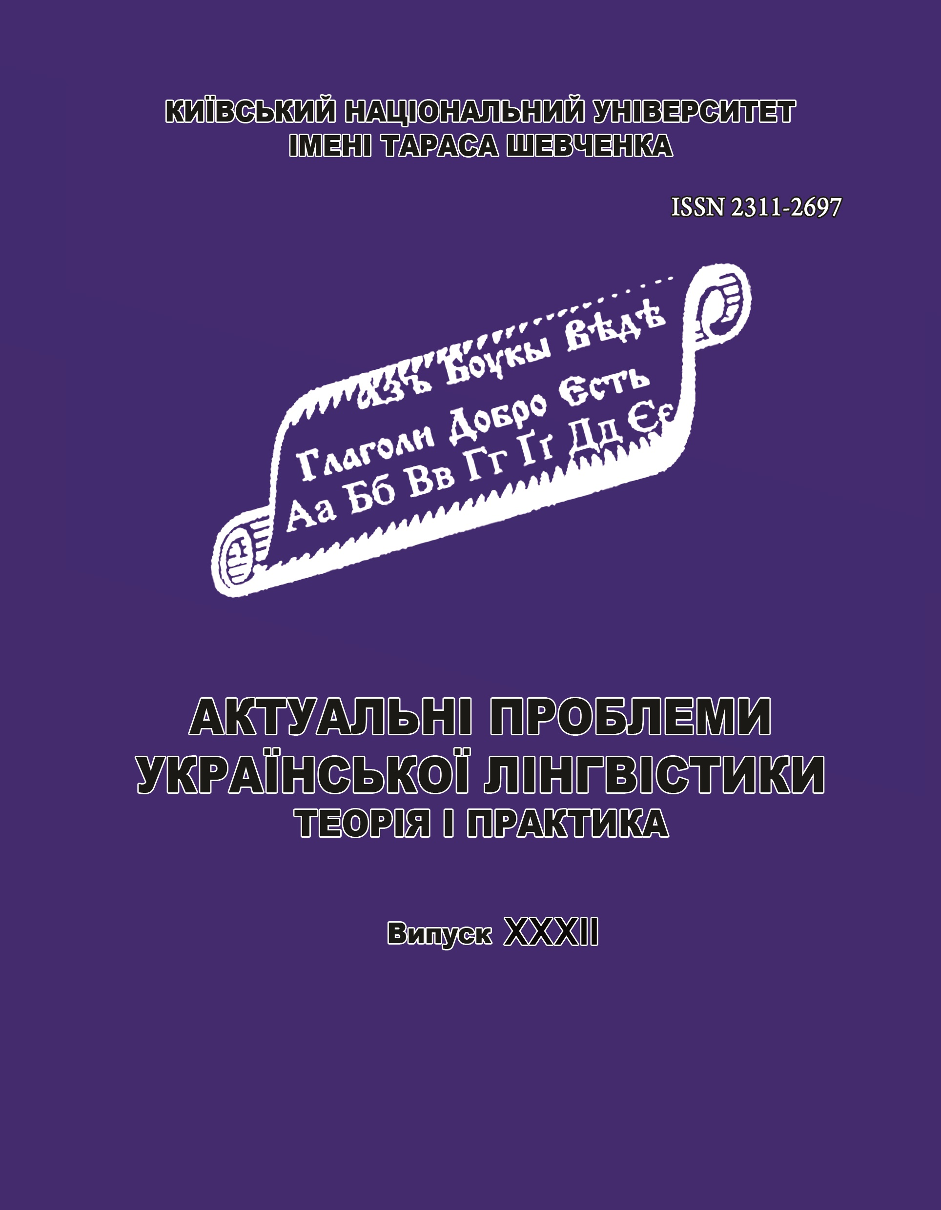 Титульна сторінка збірника (2015-2020)